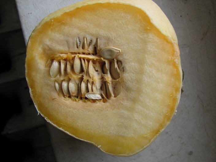 Cucurbita pepo var. patisoniana